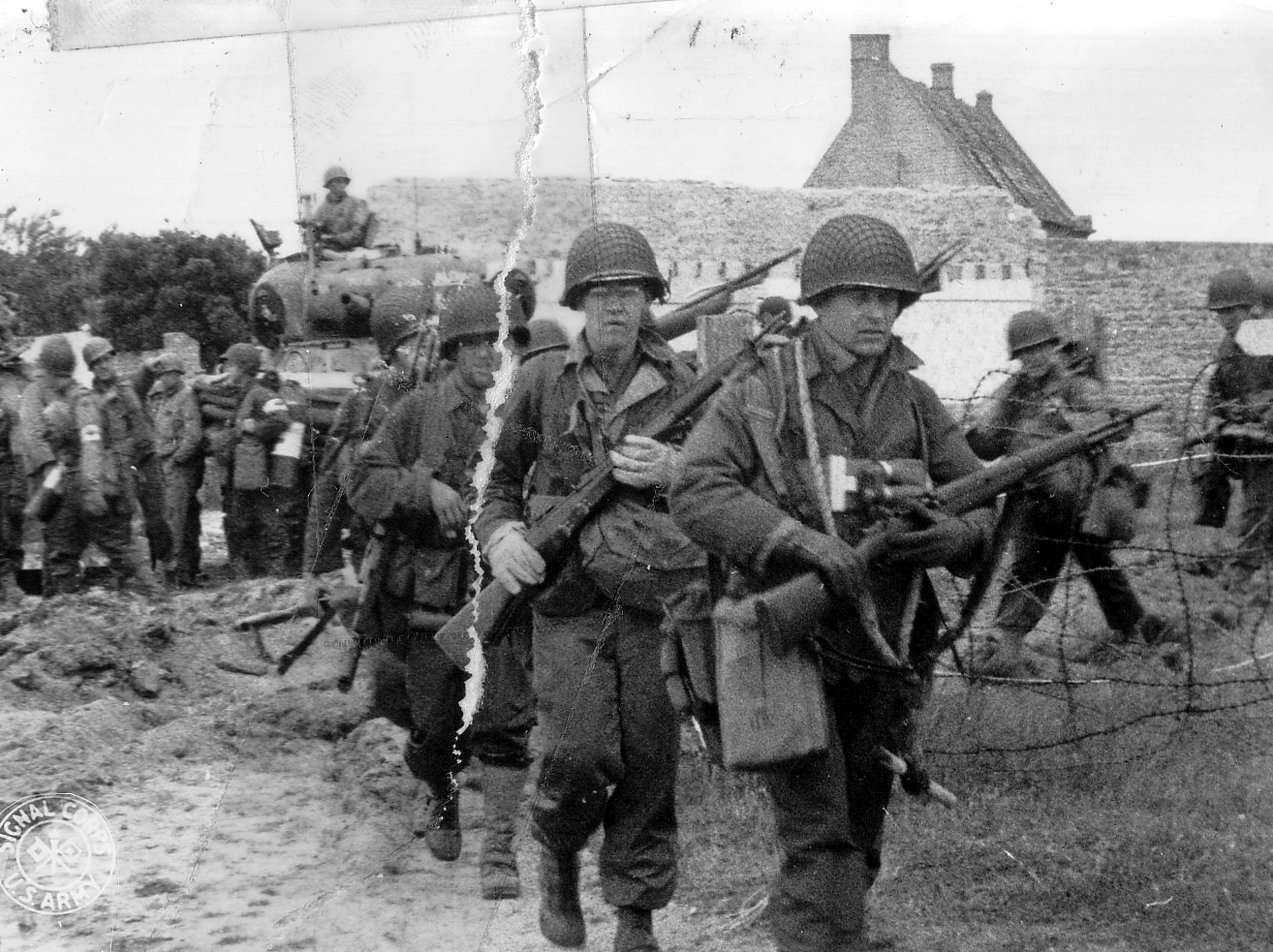 Des soldats américains débarquent sur la plage de l'Utah Beach et franchissent les barbelés posés par les troupes allemandes pour ralentir l'avancée des alliés. Ils sont appuyés par un char Sherman.